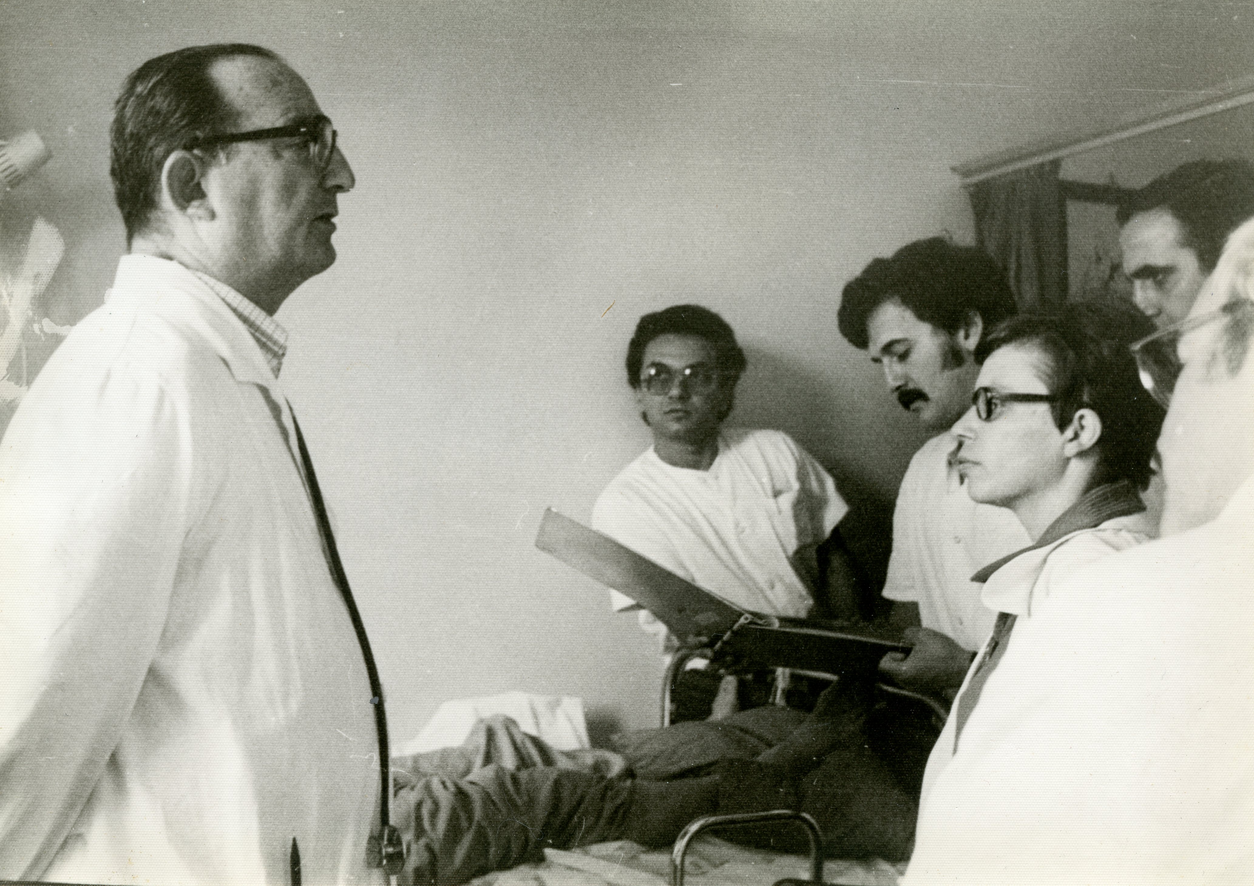 פרופ' גפל בביקור רופאים בביה"ח הדסה ת"א, 1965